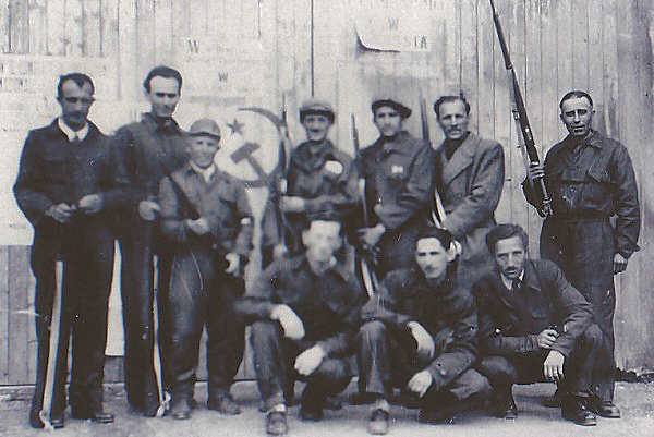 1945, Sesto San Giovanni, Breda, operai armati e riuniti per difendere la fabbrica dai nazifascisti durante la Resistenza.